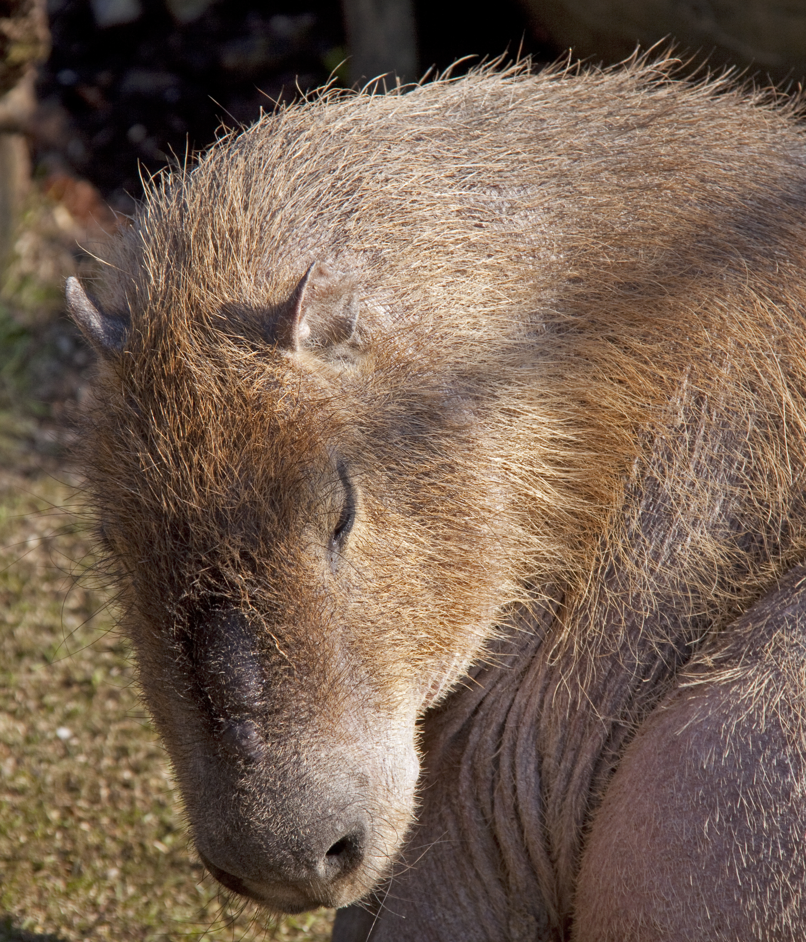 Capybara 2d